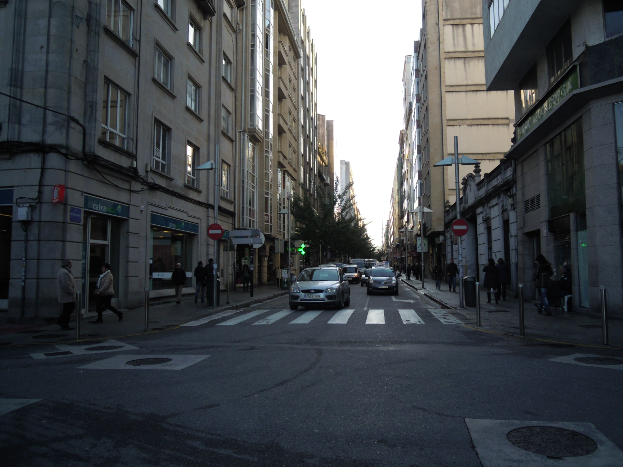 Rúa de Benito Corbal de Pontevedra; cruzamento coas rúas de Eduardo Cobián Roffignac e Daniel de la Sota.